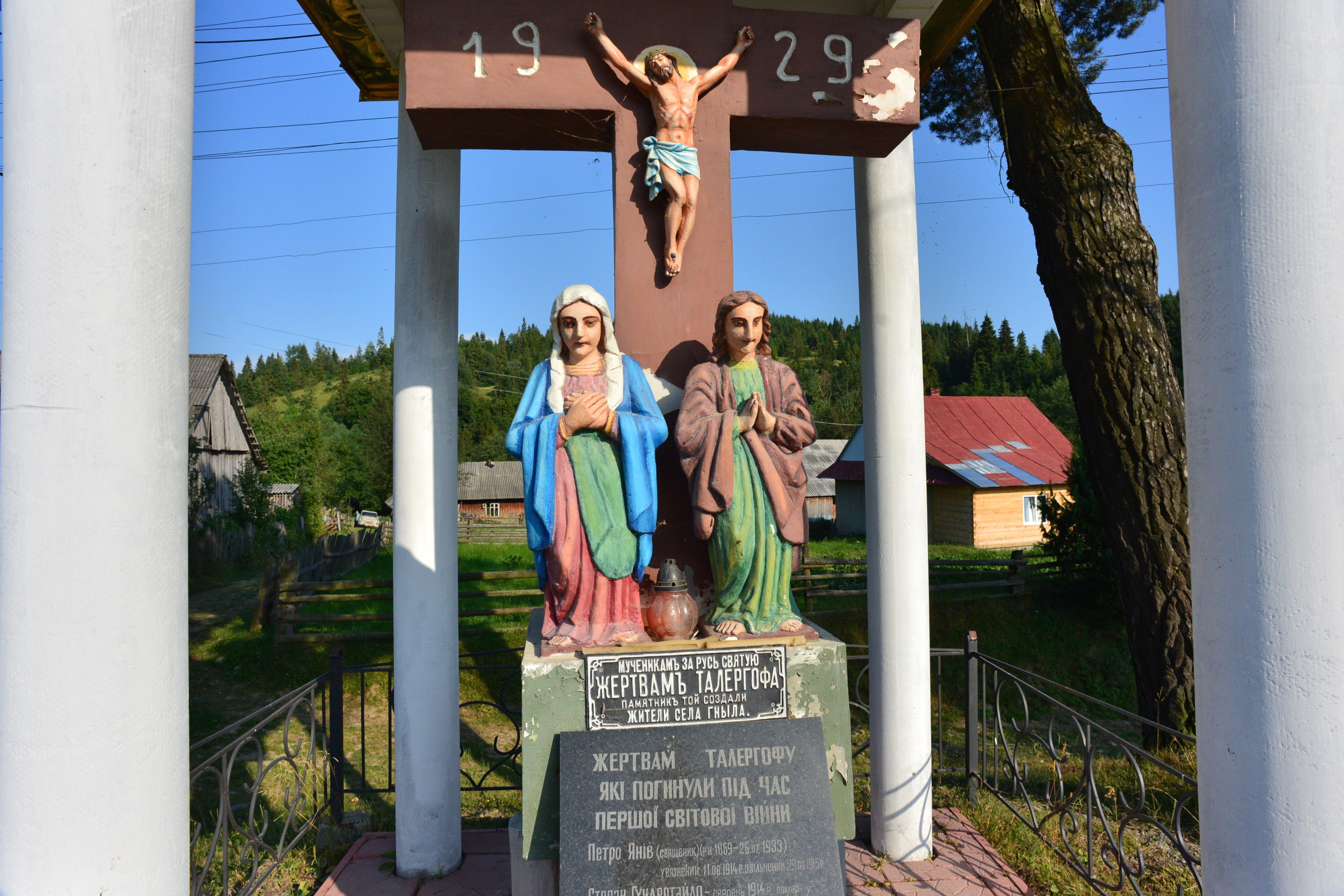 Пам'ятник жертвам табору Талергоф, с. Карпатське